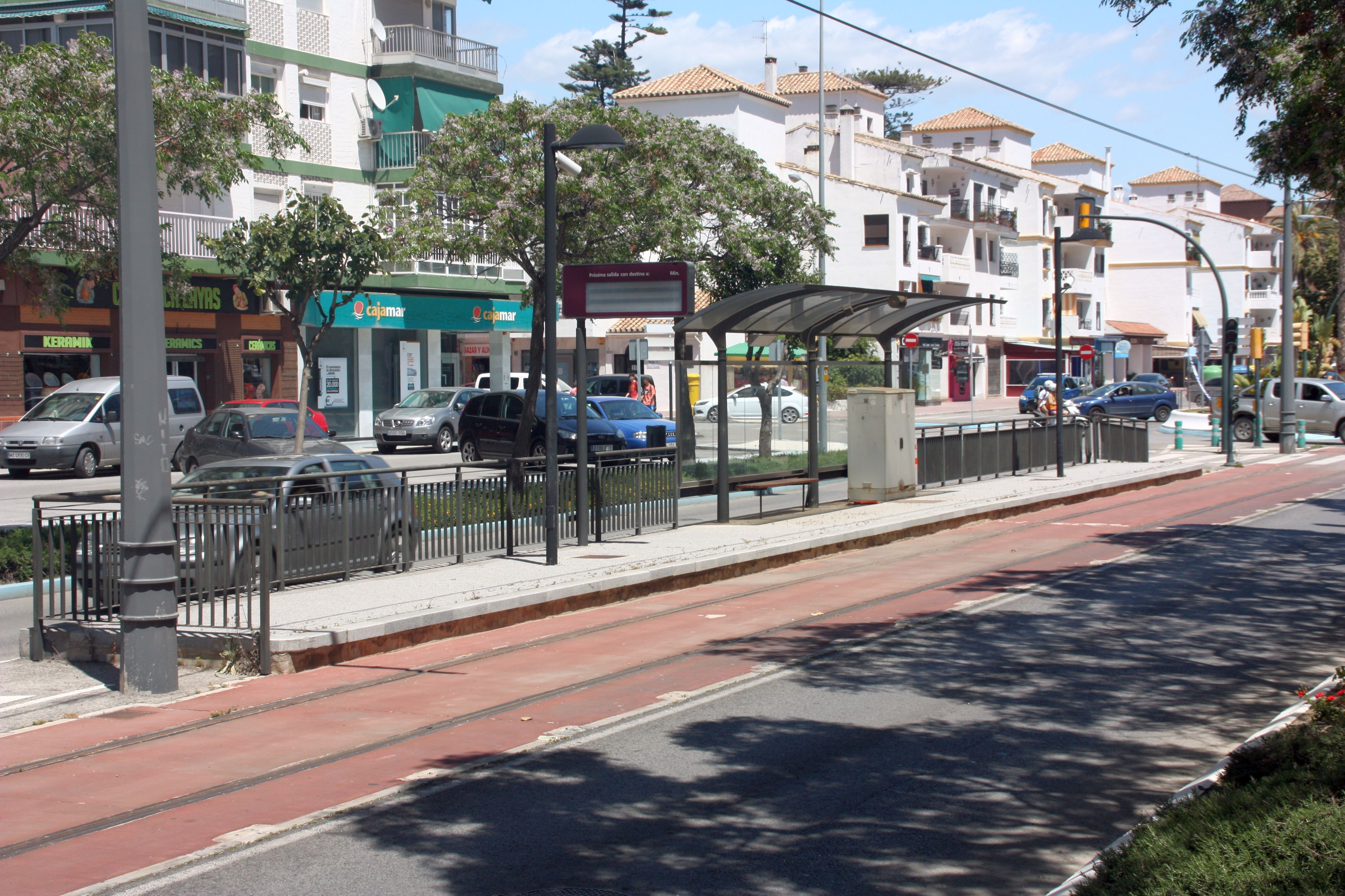 Straßenbahnhaltestelle in Torre del Mar (zur Zeit nicht in Betrieb)